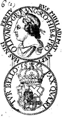 Cromwelltaler aus Kundmanns Numi Singulares